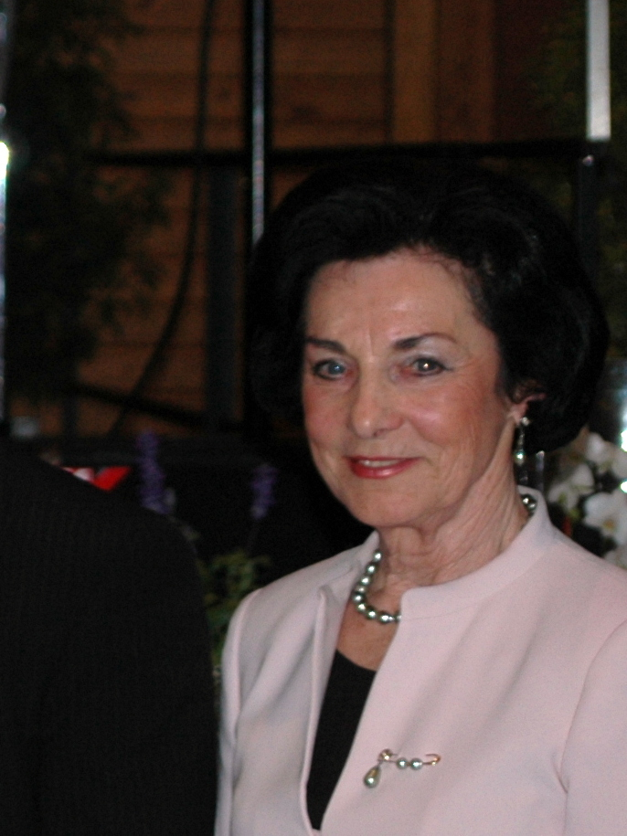 48. Jahre Partnerschaft Vertus - Bammental: Diemut Theato